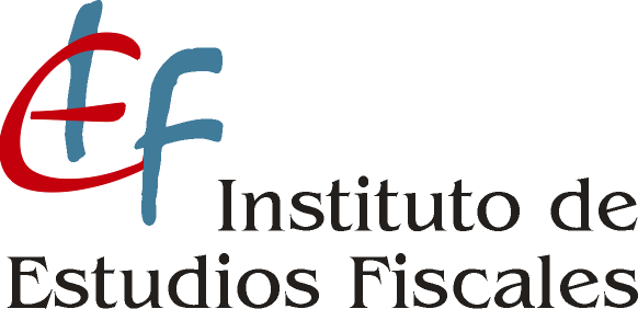 Logo del Instituto de Estudios Fiscales